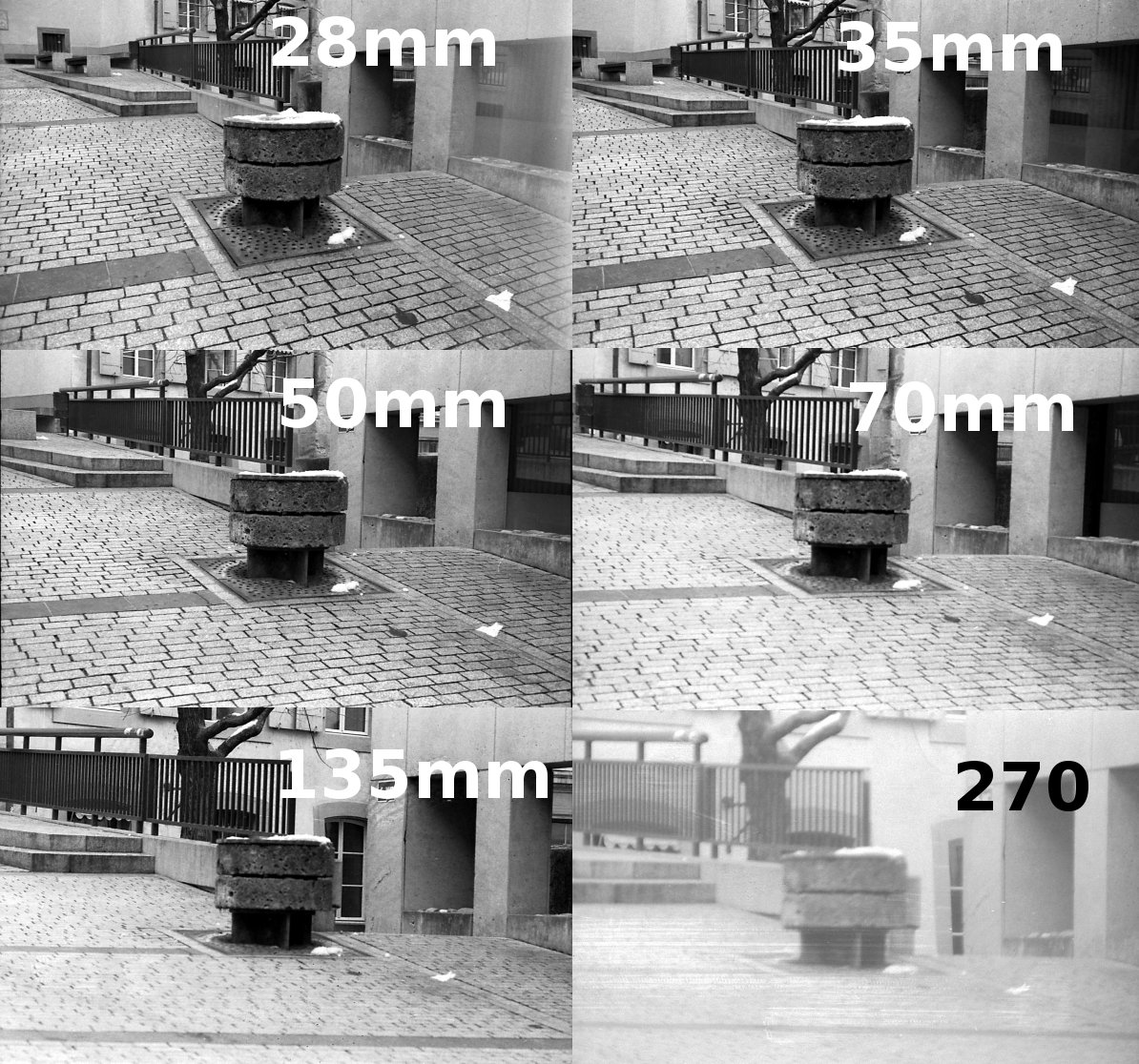 Place de la Louve, Lausanne, Suisse